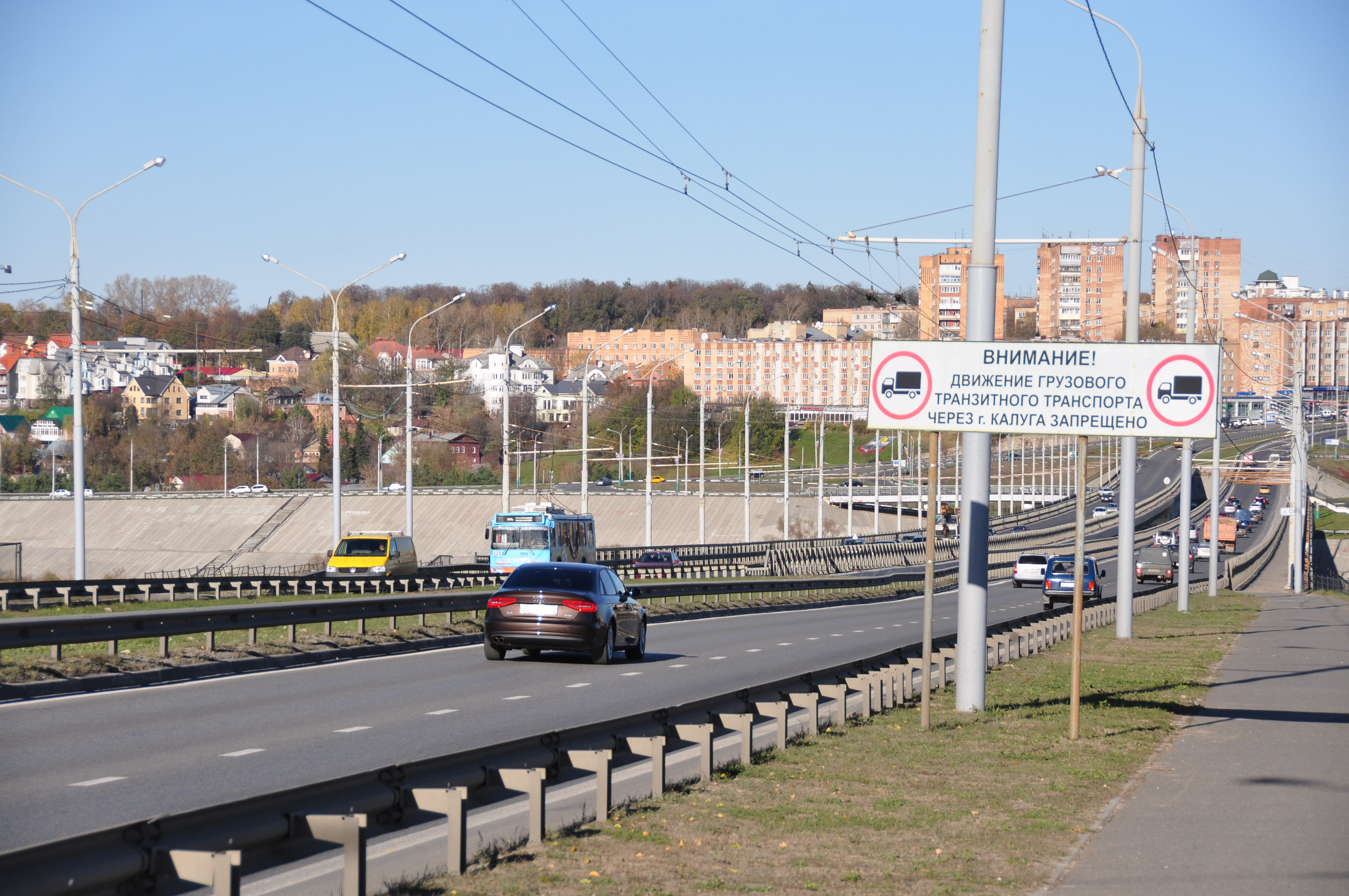 Kalouga - Калуга